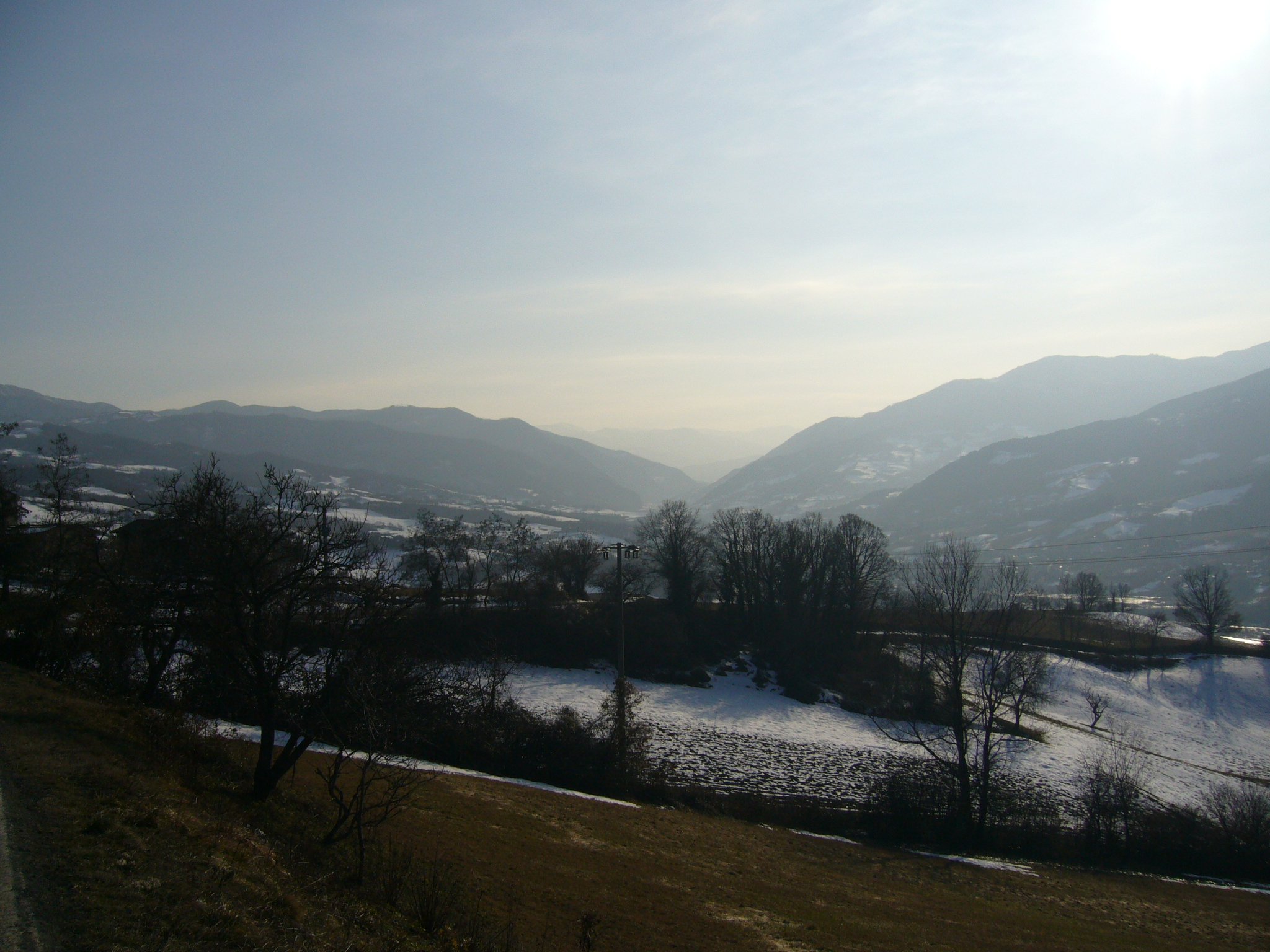 vista della val nure da sopra Bettola.Sono l'autore della foto